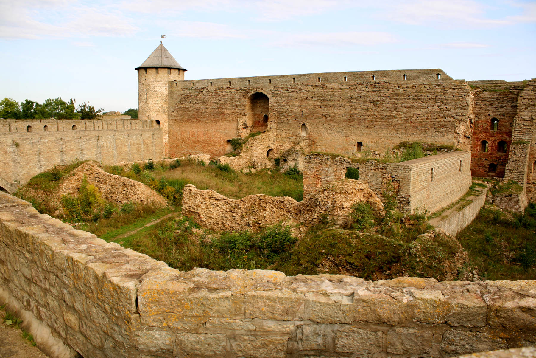 Прясла между Провиантской, Колодезной, Пороховой и Воротной башнями со всходом у Пороховой башни (Санкт-Петербург и Лен.область, Ивангород, Девичья Гора)